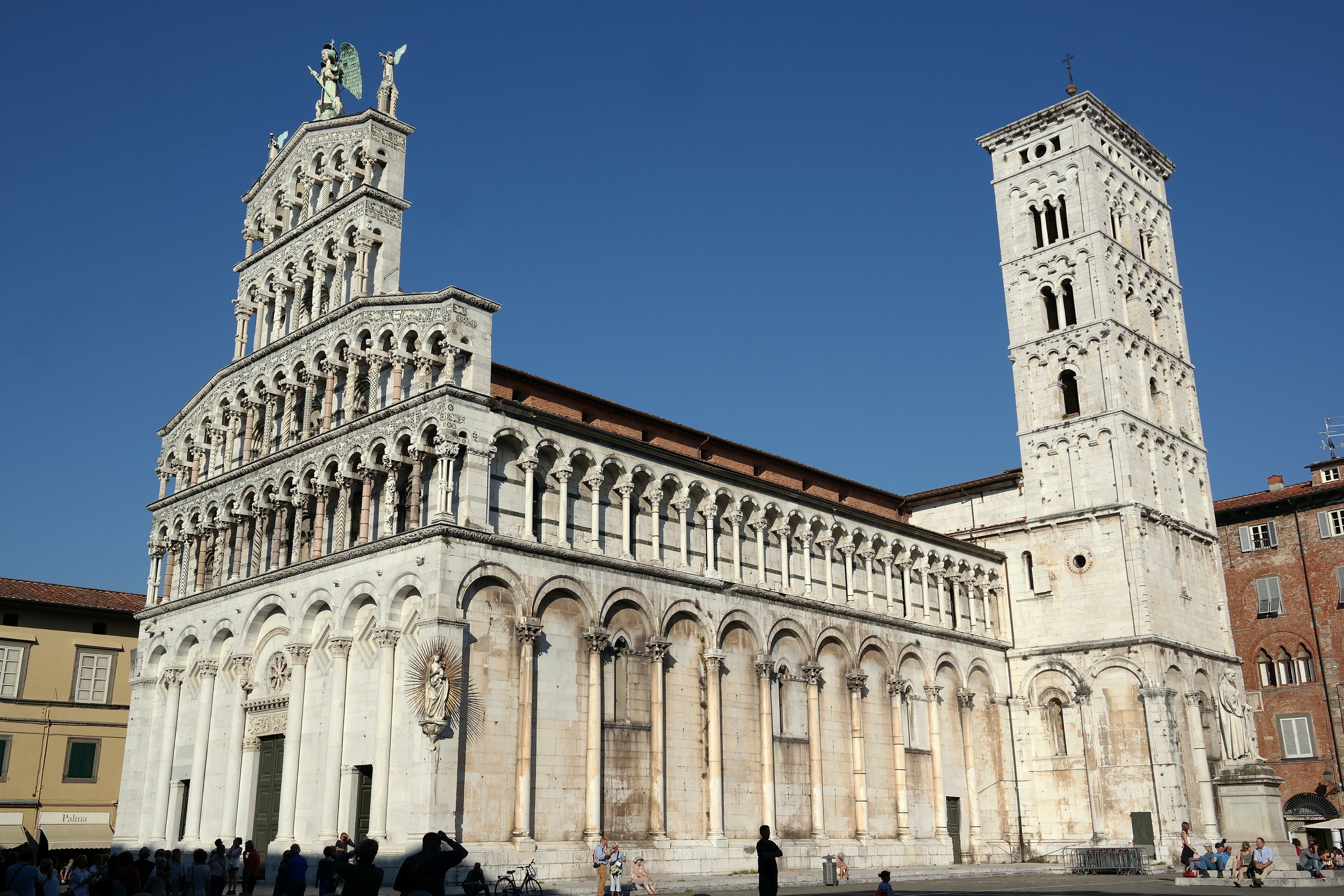 Chiesa di San Michele in Foro a Lucca